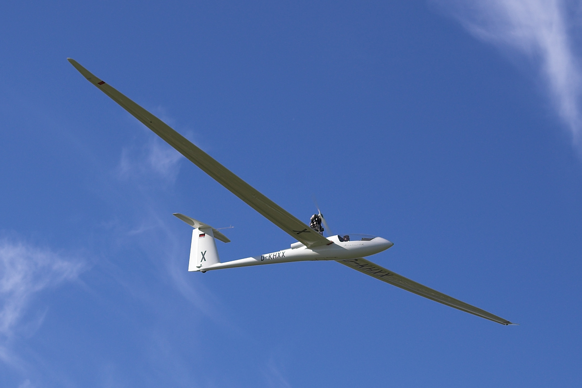 Schempp-Hirth Nimbus 4M D-KHXX